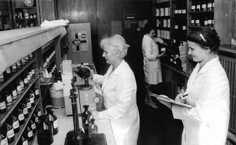 Dresden, Apothekerin, Rezepturraum Zum Beitrag: Der „Pillendreher“ ist passé - Mitarbeiter der Schweriner Bezirksapothekeninspektion vor Ort ADN-ZB Pätzold - 8.1.1987 - Die Mitarbeiter der Apothekeninspektion im Bezirk Schwerin kennen die 64 Apotheken dieses Territoriums wie ihre Westentasche. Sie geben sachkundigen Rat beim Anfertigen von Rezepturen, zur ordnungsgemäßen Lagerung und anderem. Auch dienen ihre Besuche der Kontrolle, ob arznei- und suchtmittelrechtliche Bestimmungen strikt eingehalten werden. Hier überwacht Apothekerin Deta Neubauer von der Apothekeninspektion (rechts) in der Schweriner Fritz-Reuter-Apotheke die Entnahme von Proben durch Pharmazieingenieur Hannelore Oldenburg (links). Die Rolle der Inspekteure hat sich gegenüber früheren Zeiten vom gefürchteten Revisor zum geachteten Partner der Apotheken gewandelt, wobei Gütekontrollen selbstverständlich eingeschlossen sind. (Hierzu gehören die Fotos 1987-0108-302N und 303N!) Information added by Wikimedia users.